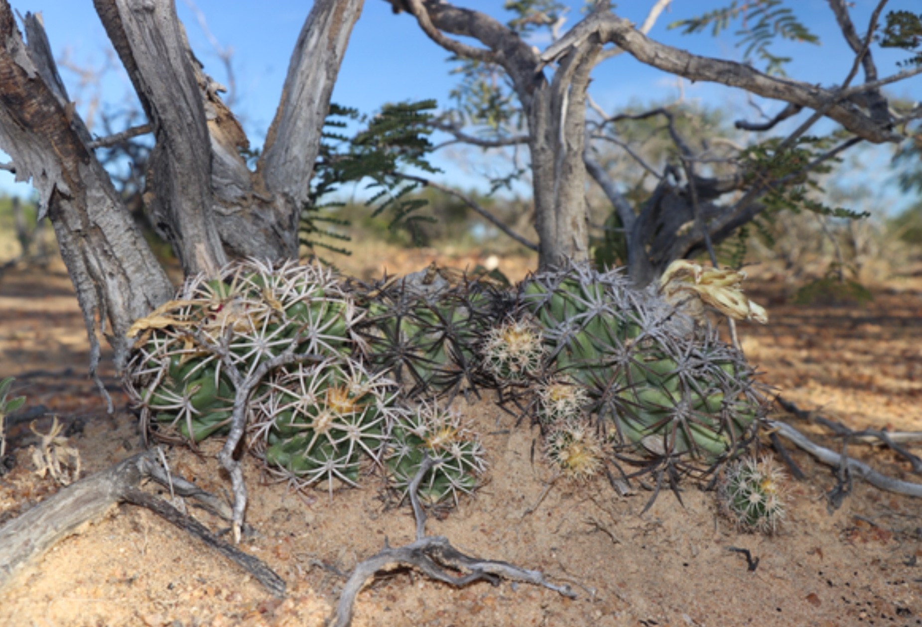 Discocactus zehntneri ssp. petr-halfari Bahia Brasil